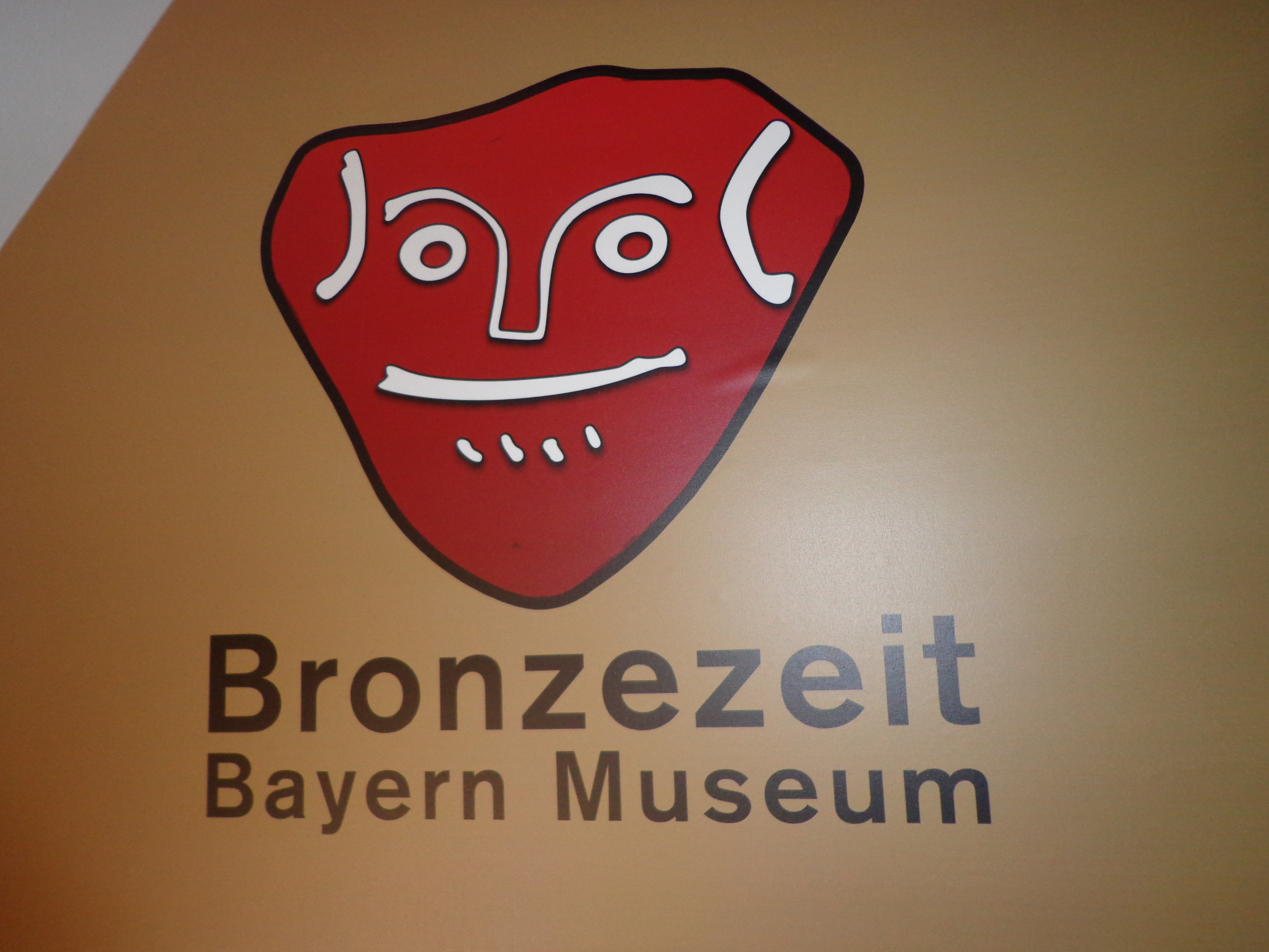 Dieses Museum in Kranzberg (Landkreis Freising) wurde am 16. Mai 2014 eröffnet.